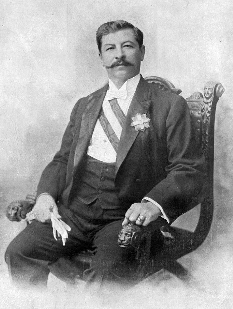 Juan Vicente Gómez Chacón (24 de julio de 1857,La Mulera, Táchira, Venezuela - 17 de diciembre de 1935, Maracay, Aragua) fue un militar y político venezolano que gobernó de manera dictatorial su país de 1908 hasta su muerte en 1935.